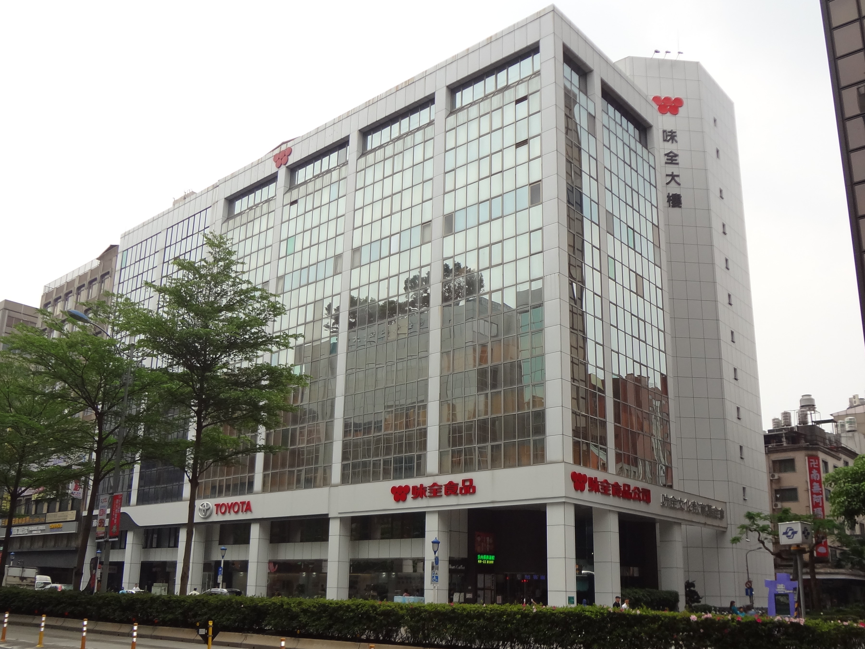 味全大樓，位於臺灣臺北市中山區松江路125號。